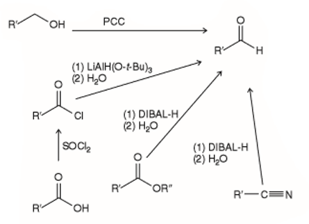 Berta, aldehido batzuen erreakzioak era eskematiko batean ikusi ditzakegu